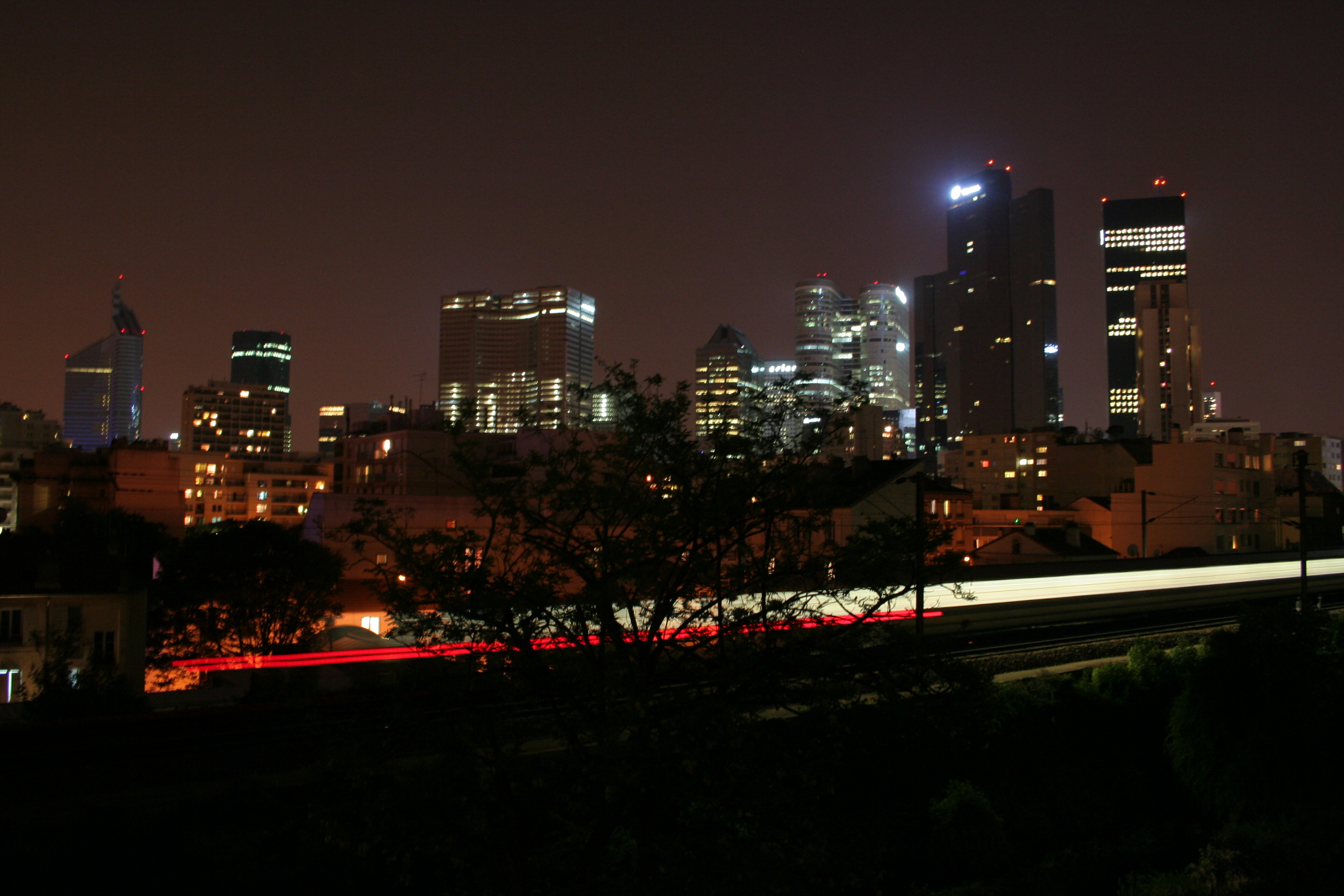 La Défense vue de Courbevoie.